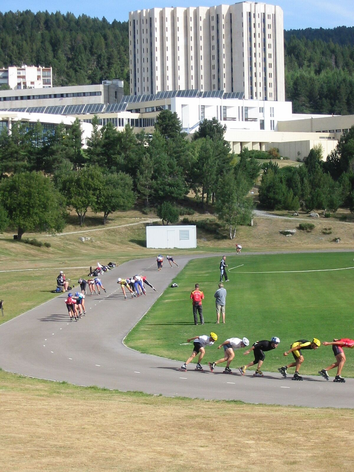 Centre d'entraînement en altitude (ici l'équipe allemande de rollers), Font-Romeu, Pyrénées-Orientales, France